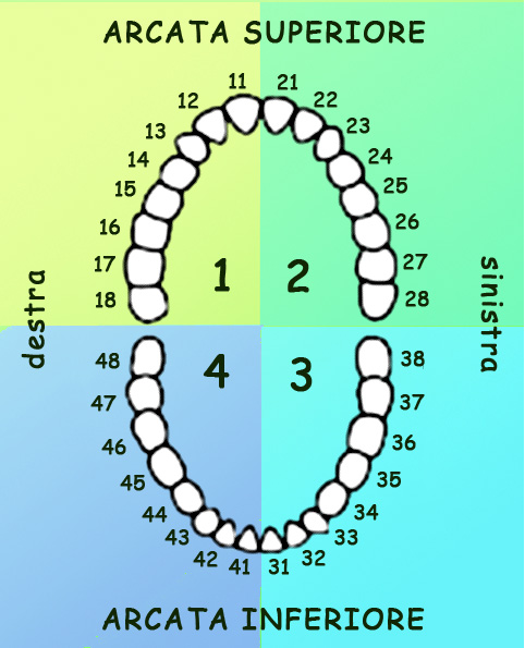 दांतों की वैज्ञानिक गिनती.